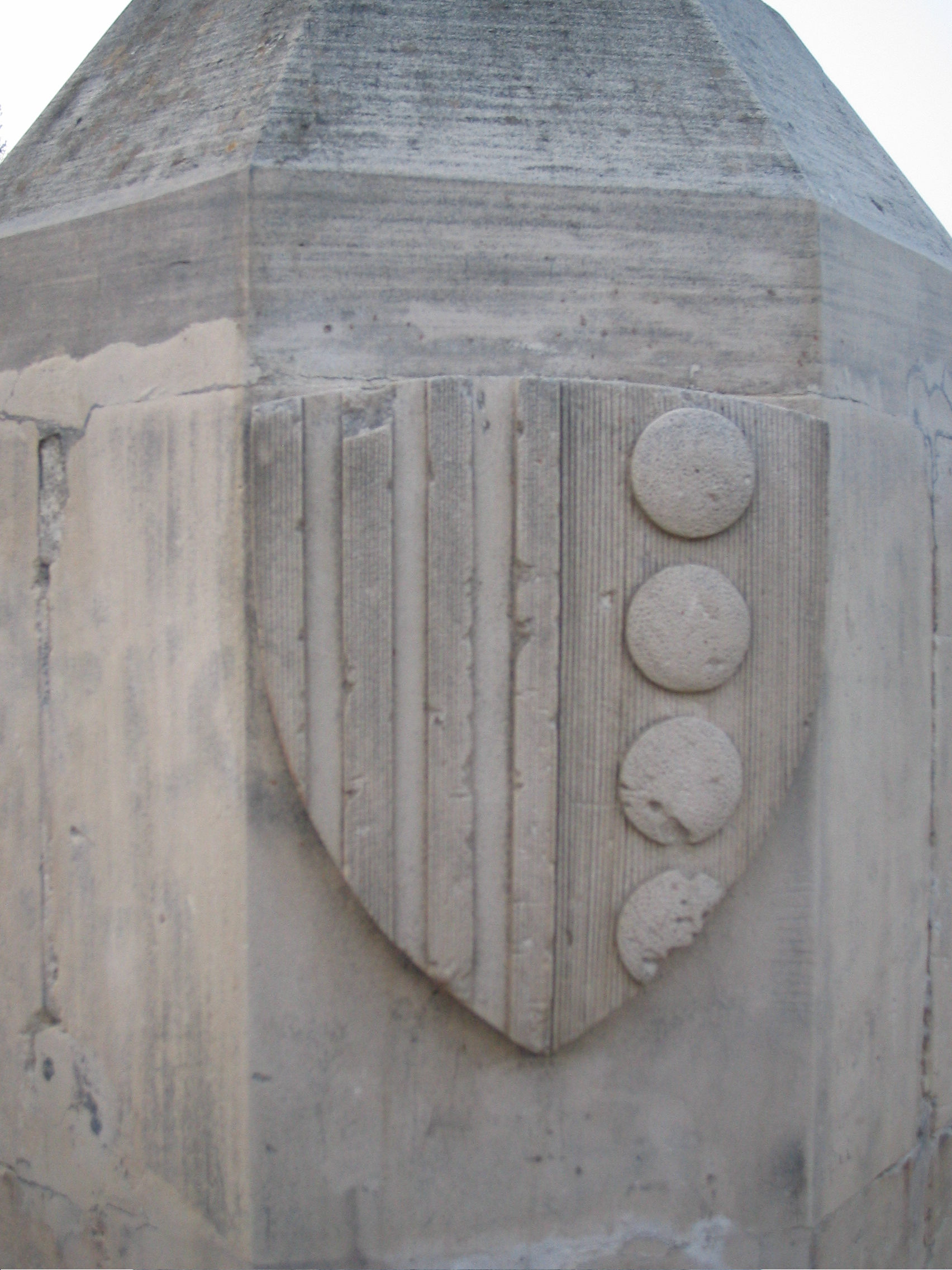 Montcada burial site basement